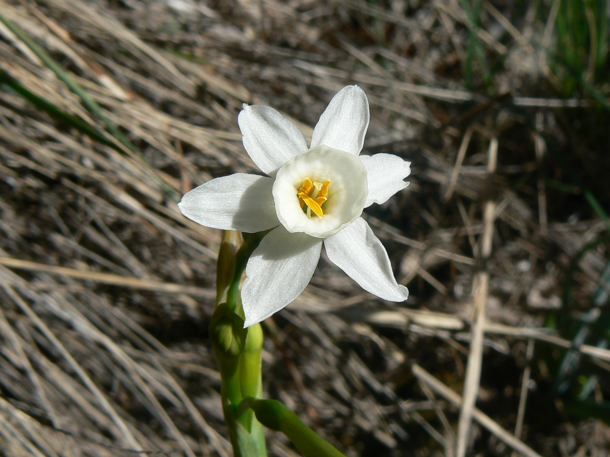 Description: Narcissus dubius Gouan